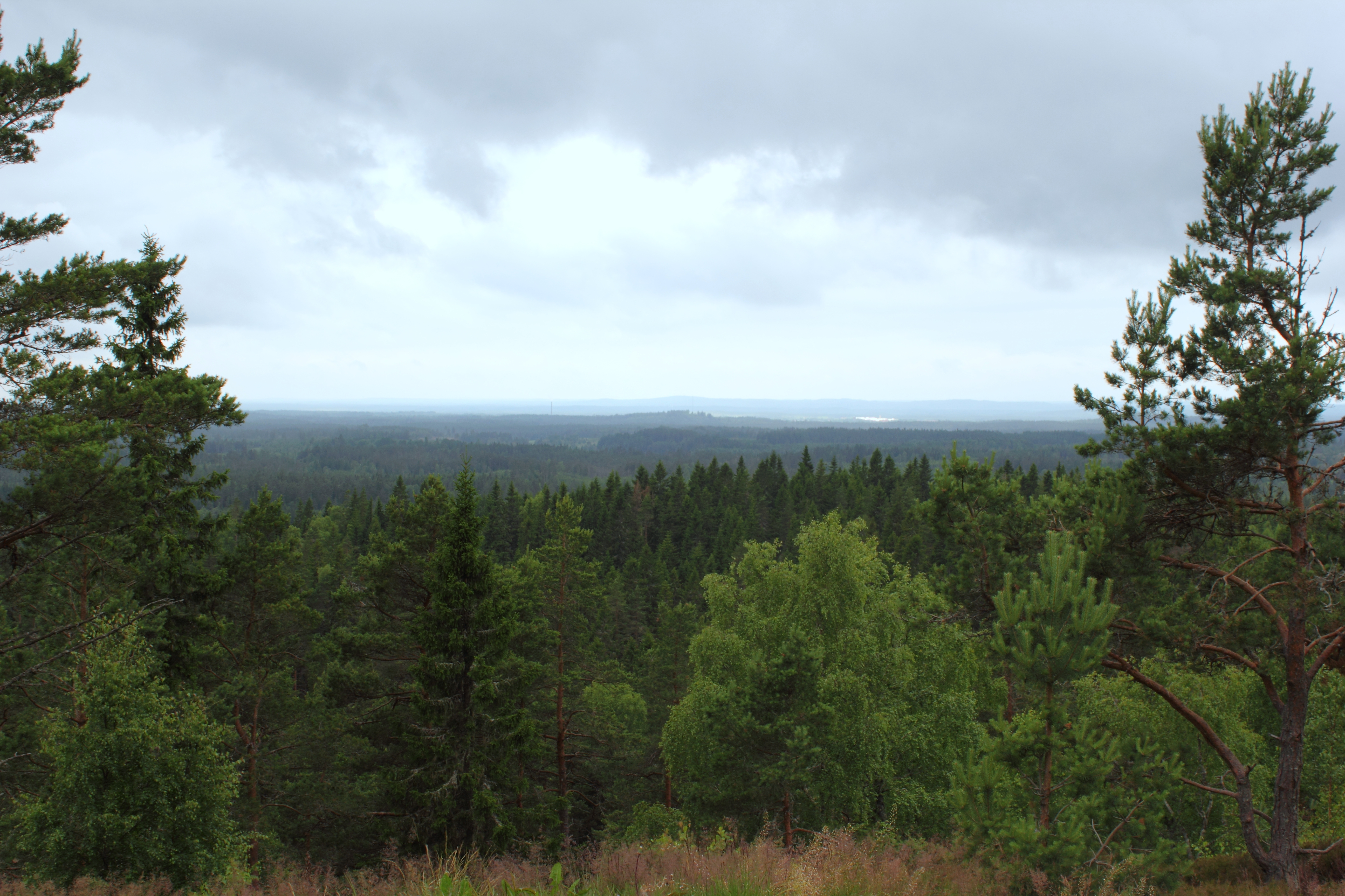 Utsikt mot söder från Skuruhatt i naturreservatet Skurugata